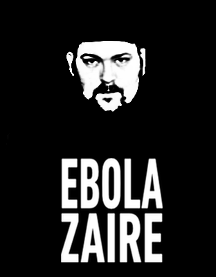 Lawrence Andrew Hayes